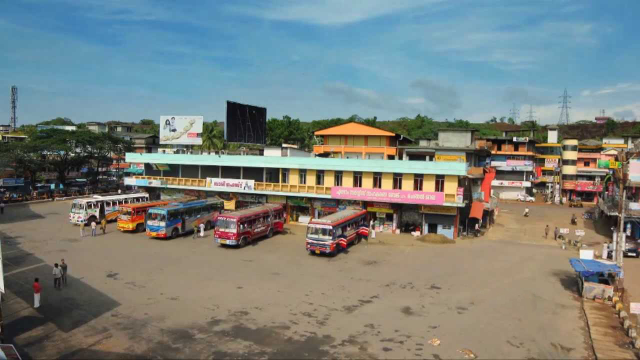 പഴയങ്ങാടി ബസ്സ്‌ സ്റ്റാന്റ്